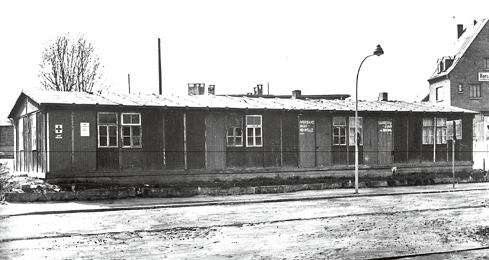 Am Anfang war die Geschäftsstelle des Landesverbands in einer Baracke in Koblenz.